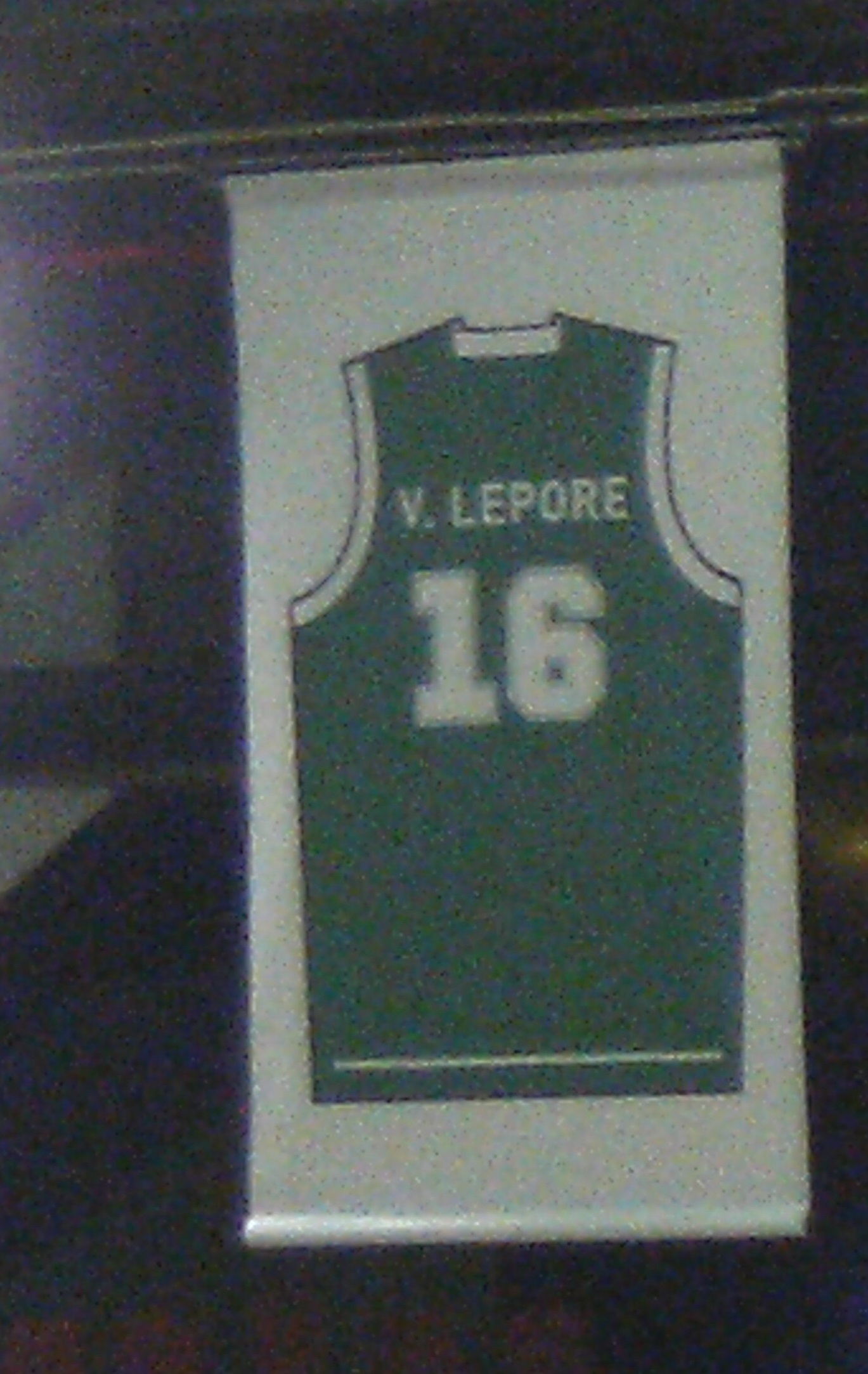 Felice Scandone Basket Avellino Riproduzione maglia di Vito Lepore presso il Palasport Giacomo Del Mauro di Avellino